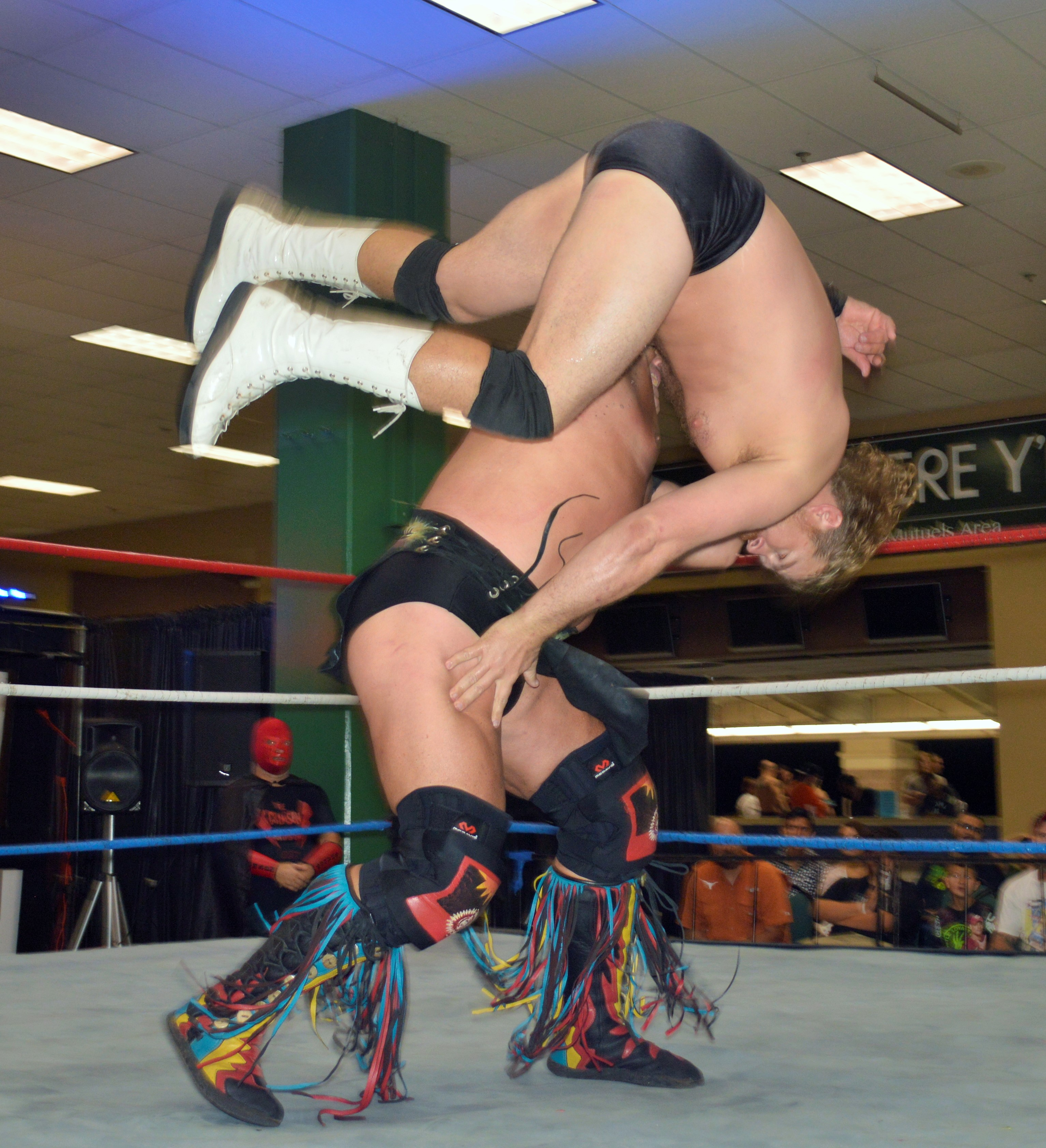 Le catcheur Tatanka (slip noir et bottes noires) exécute un Swinging Sideslam